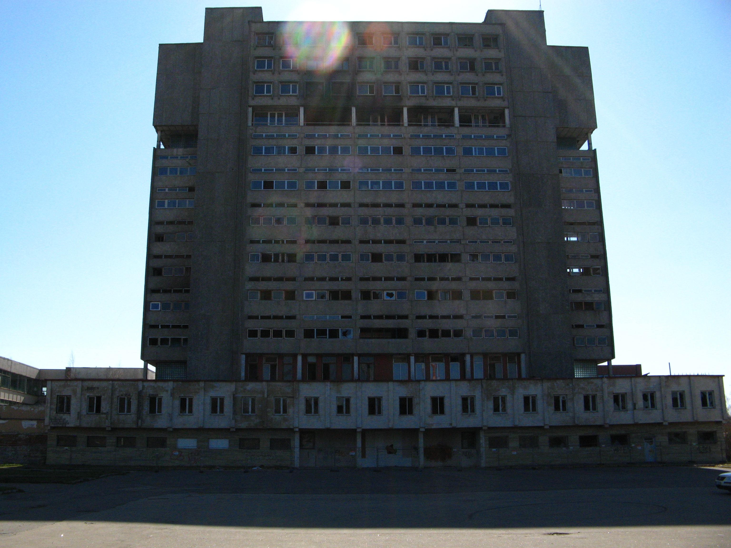 Rīgas Radio rūpnīcas ēka, 12.04.2016